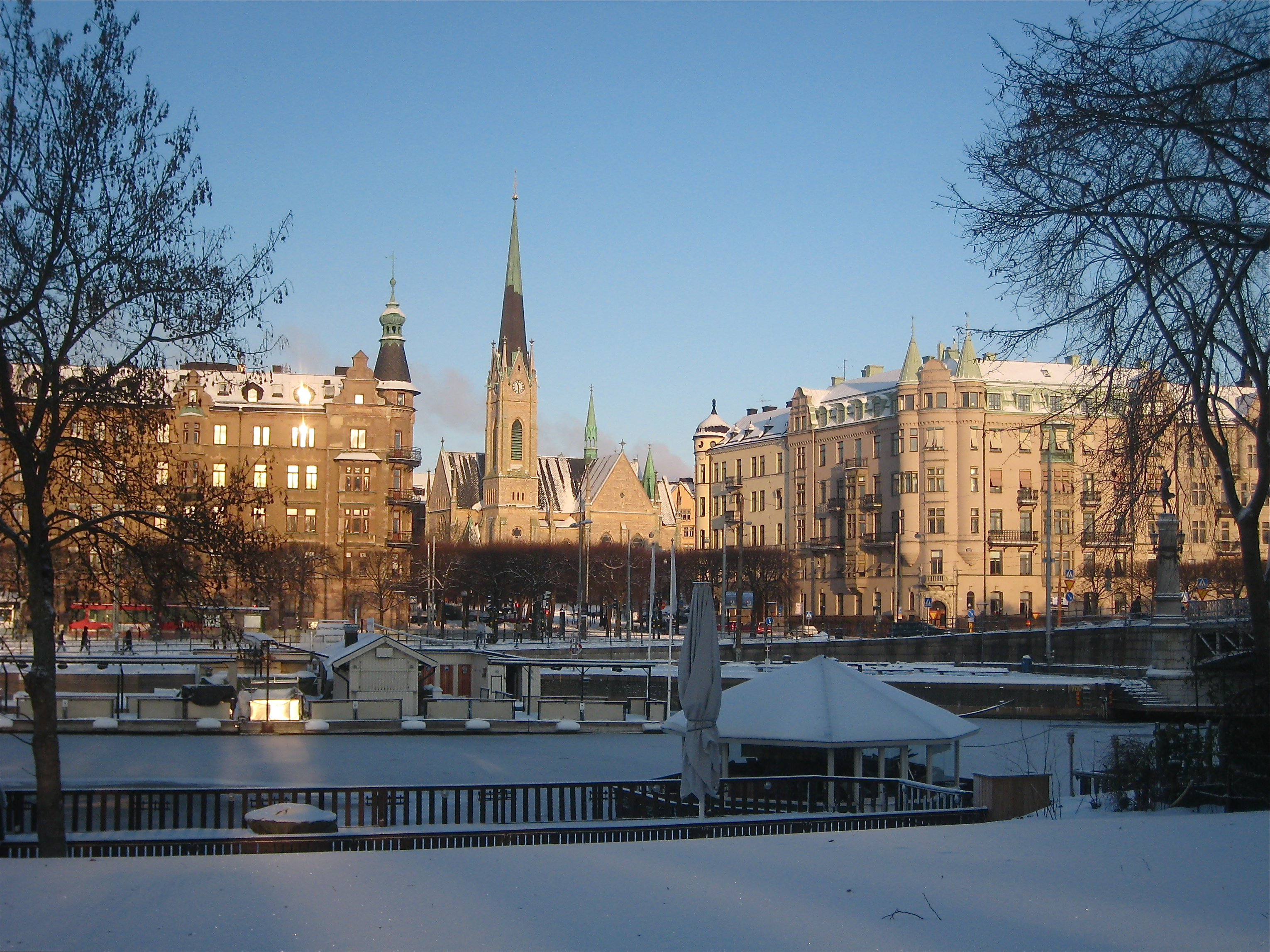 Narvavägen och Oskarskyrkan sedda från Djurgården. I förgrunden Strandvägen och Djurgårdsbron.